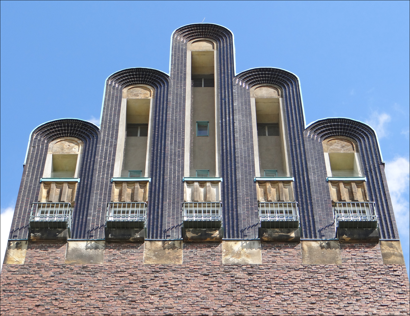 La Tour du mariage (Wedding tower, Hochzeitsturm) a été conçue par l'architecte Joseph Maria Olbrich (1867-1908) pour servir de signal à la colonie d'artistes jugendstil et honorer son fondateur, le Grand-Duc Ernst Ludwig de Hesse Elle est surmontée d'une couronne à cinq doigts La tour a été érigée en 1908 sur la Mathildenhöhe (la colline de Mathilde) à l'initiative de la ville de Darmstadt en l'honneur du second mariage du Grand-Duc Ernst Ludwig de Hesse (Louis V de Hesse) qui avait eu lieu en 1905 avec Eléonore de Solms-Hohensolm-Lich. Très dégradée après la dernière guerre comme tous les bâtiments de la colline dont certains avaient été détruits par les bombardements alliés, l'extérieur et l'intérieur de la tour ont été totalement restaurés de 1982 à 1990 dans le cadre de la rénovation de la Mathildenhöhe. Dans ce lieu emblématique et culturel de Darmstadt, la ville offre la possibilité d'organiser des fêtes et propose une grande salle décorée appelée la chambre du mariage pour la cérémonie civile.